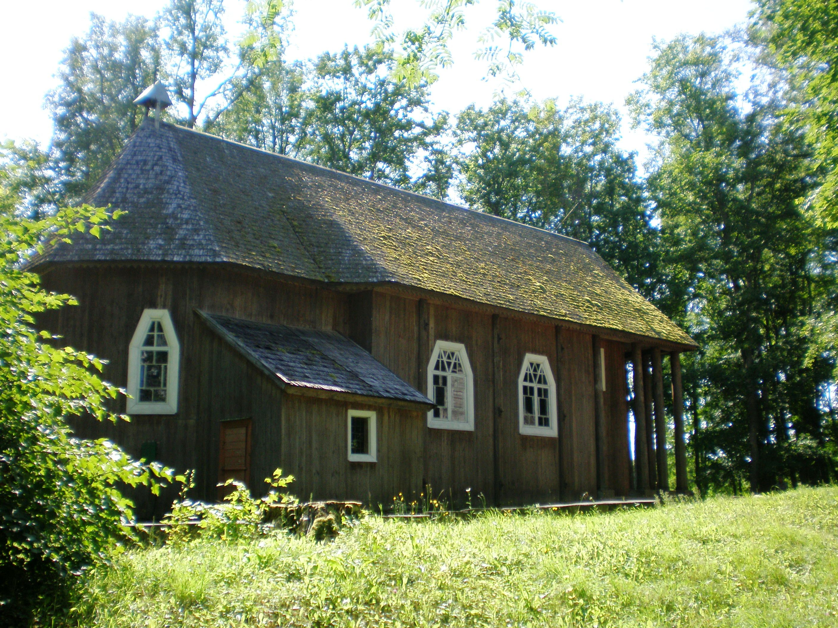 Stelmužės bažnyčia, Zarasų raj., Lietuva